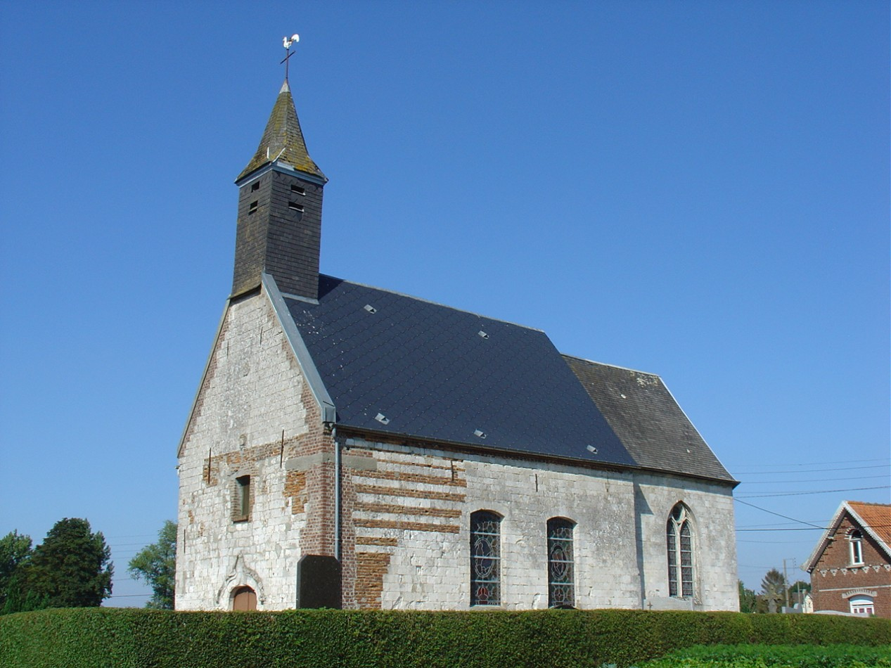 Église de Marquay